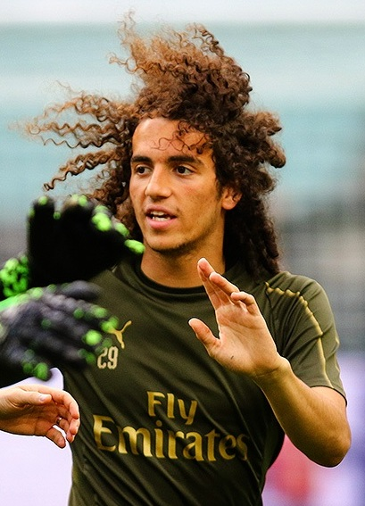 تمرین تیم فوتبال آرسنال پیش از فینال لیگ قهرمانان اروپا ۲۰۱۹